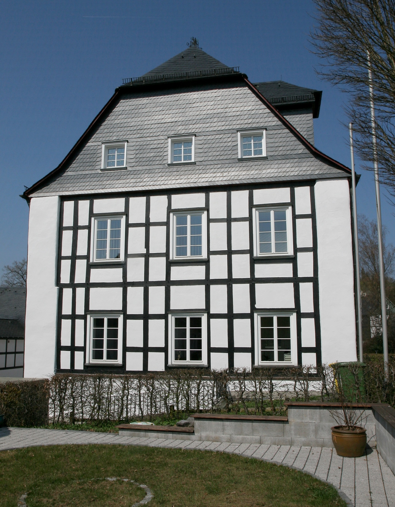 Altes Kloster in Drolshagen. This image shows a heritage building in Germany, located in the North Rhine-Westphalian city Drolshagen (no. 2).